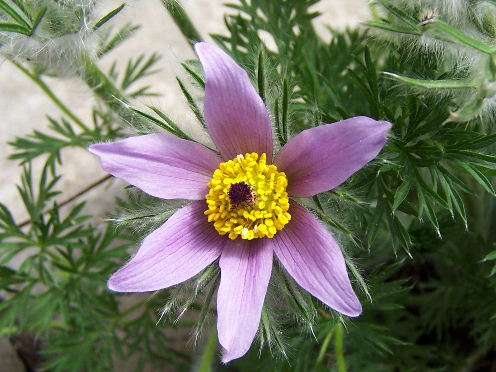 Pulsatilla vulgaris